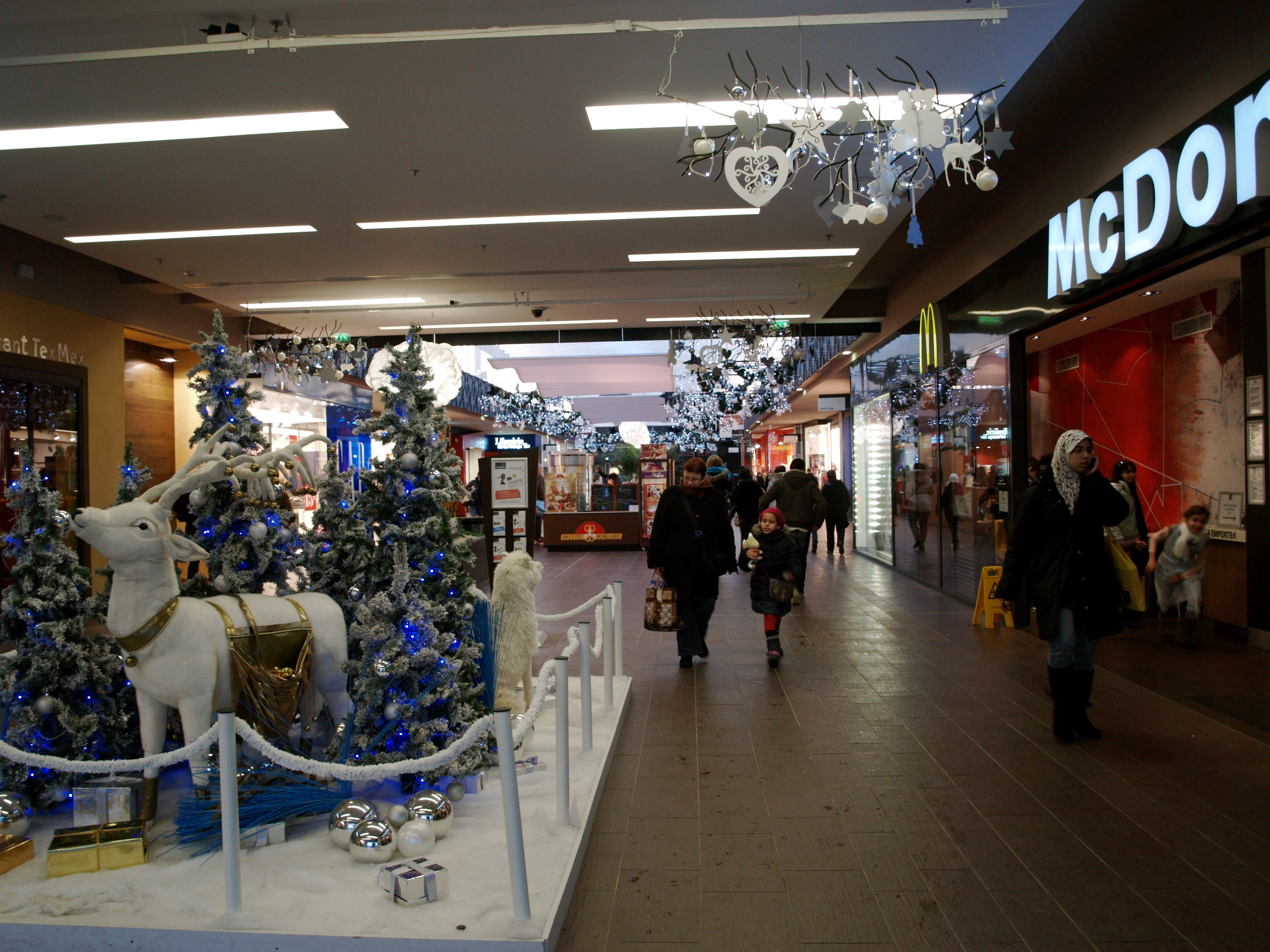 Le centre commercial Rivétoile, à Strasbourg